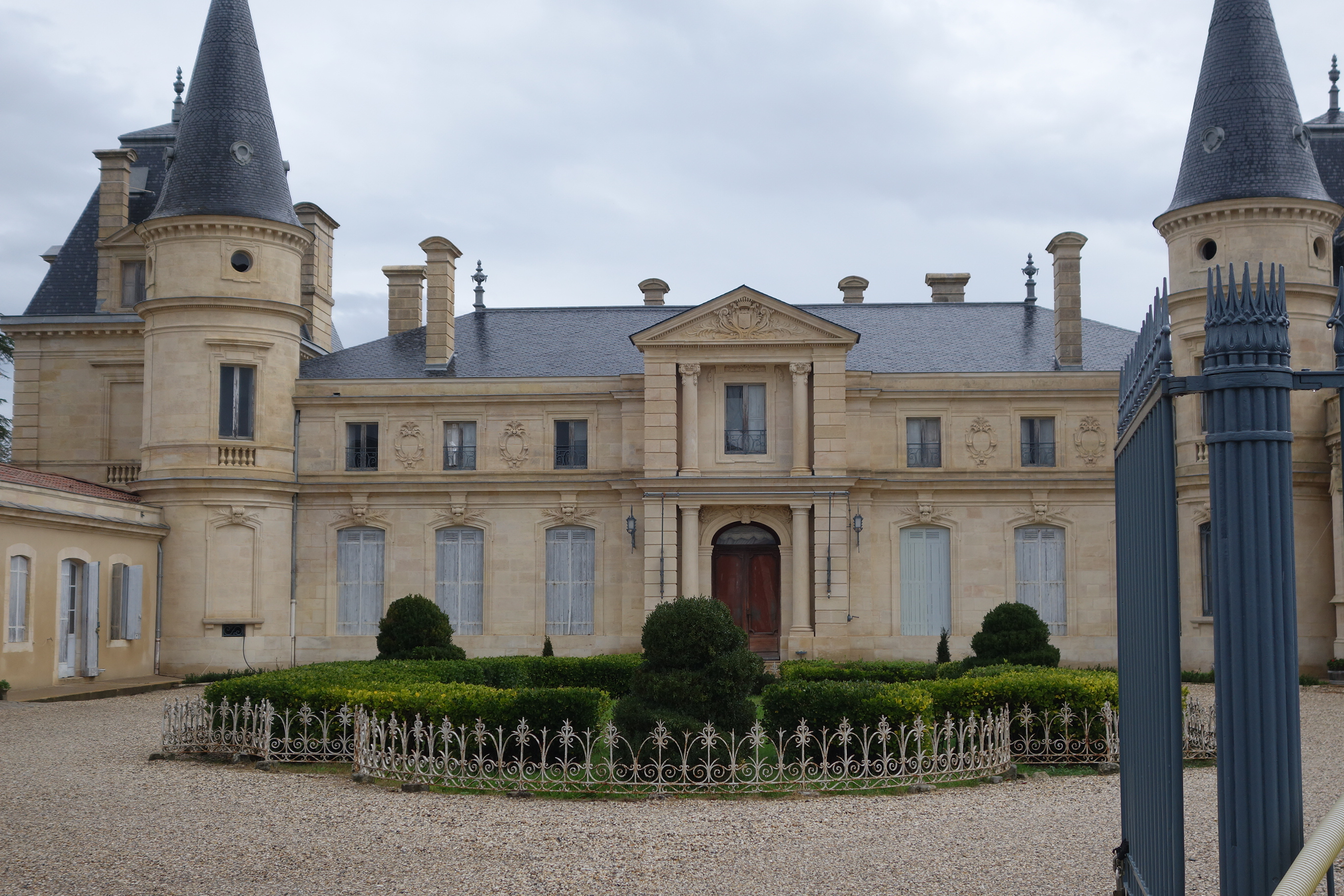 façade principale avec les armoiries et la couronne de comte.